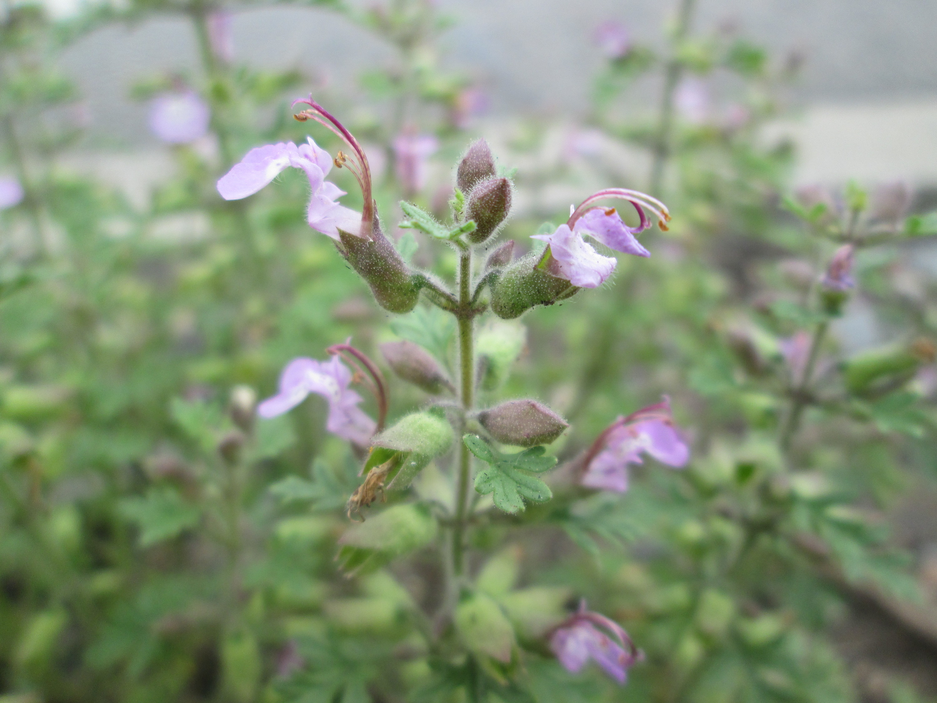 Trauben-Gamander (Teucrium botrys) in Hockenheim - gesetzt in einen Grünstreifen in einer Maßnahme des Nabu zur Erhaltung der Artenvielfalt durch Wildblumen an Straßen- und Wegrändern